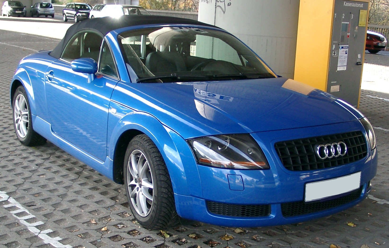 Audi TT, 1. Generation